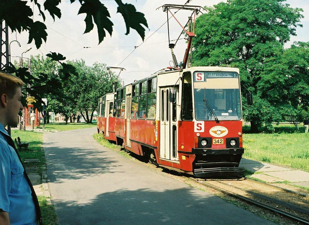 Tramwaj na pętli Wójtowa Wieś. Błagam Nemo - przeznacz w ciągu najbliższych 365 dni chociaż 1 dzień na udokumentowanie chociaż kawałka linii tramwajowej w Gliwicach. Ta linia zacznie znikać w ciągu 1-2 lat a po kilku latach zostaną tylko niewielkie fragmenty. To jest stuletnia historia gliwickich tramwajów, której kres mamy nieszczęście obserwować. Mało kto zdaje sobie sprawę z wartości dokumentalnej zdjęć, które można jeszcze zrobić...